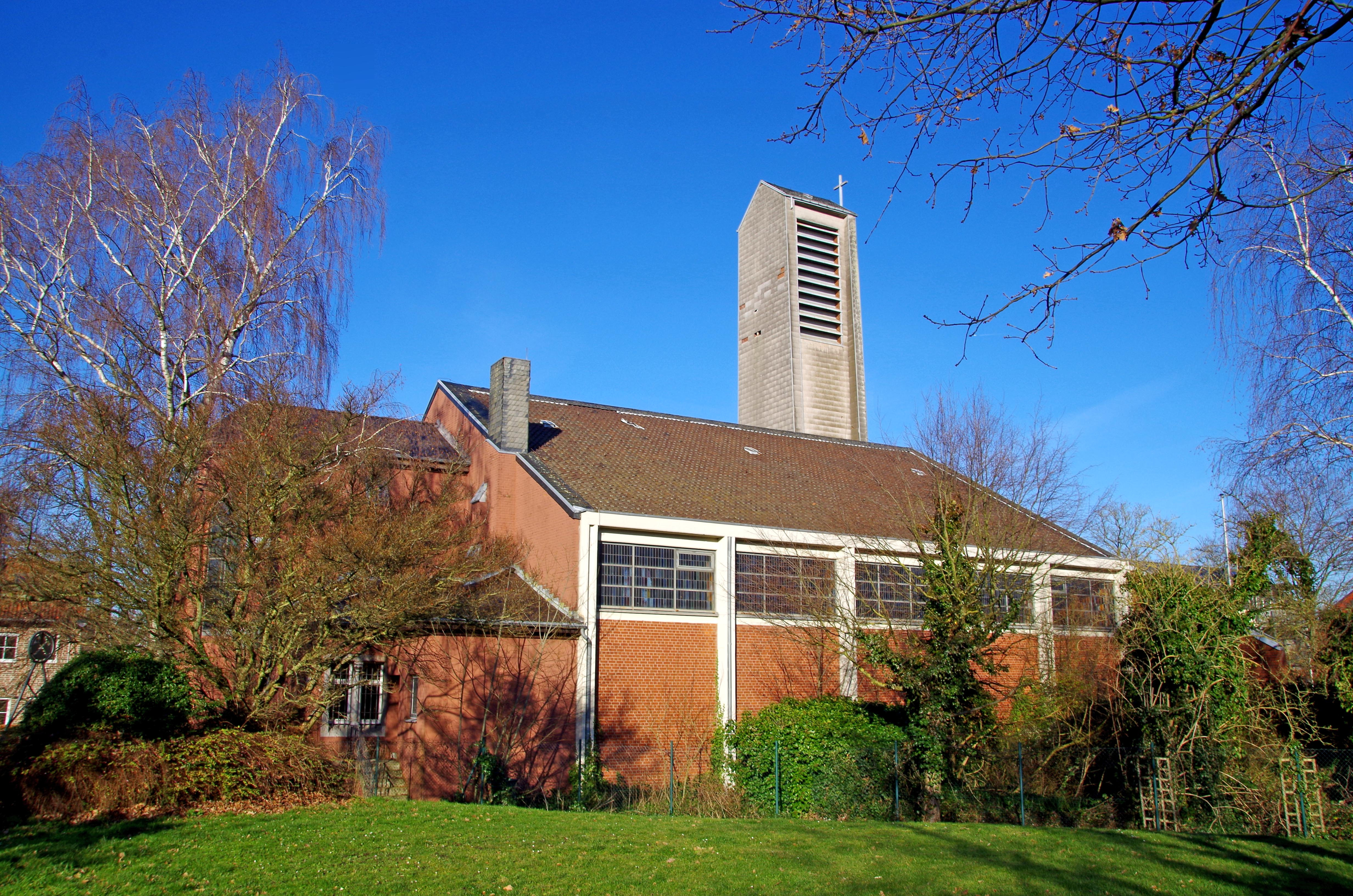 St. Balbina (Morsbach), Südwestseite